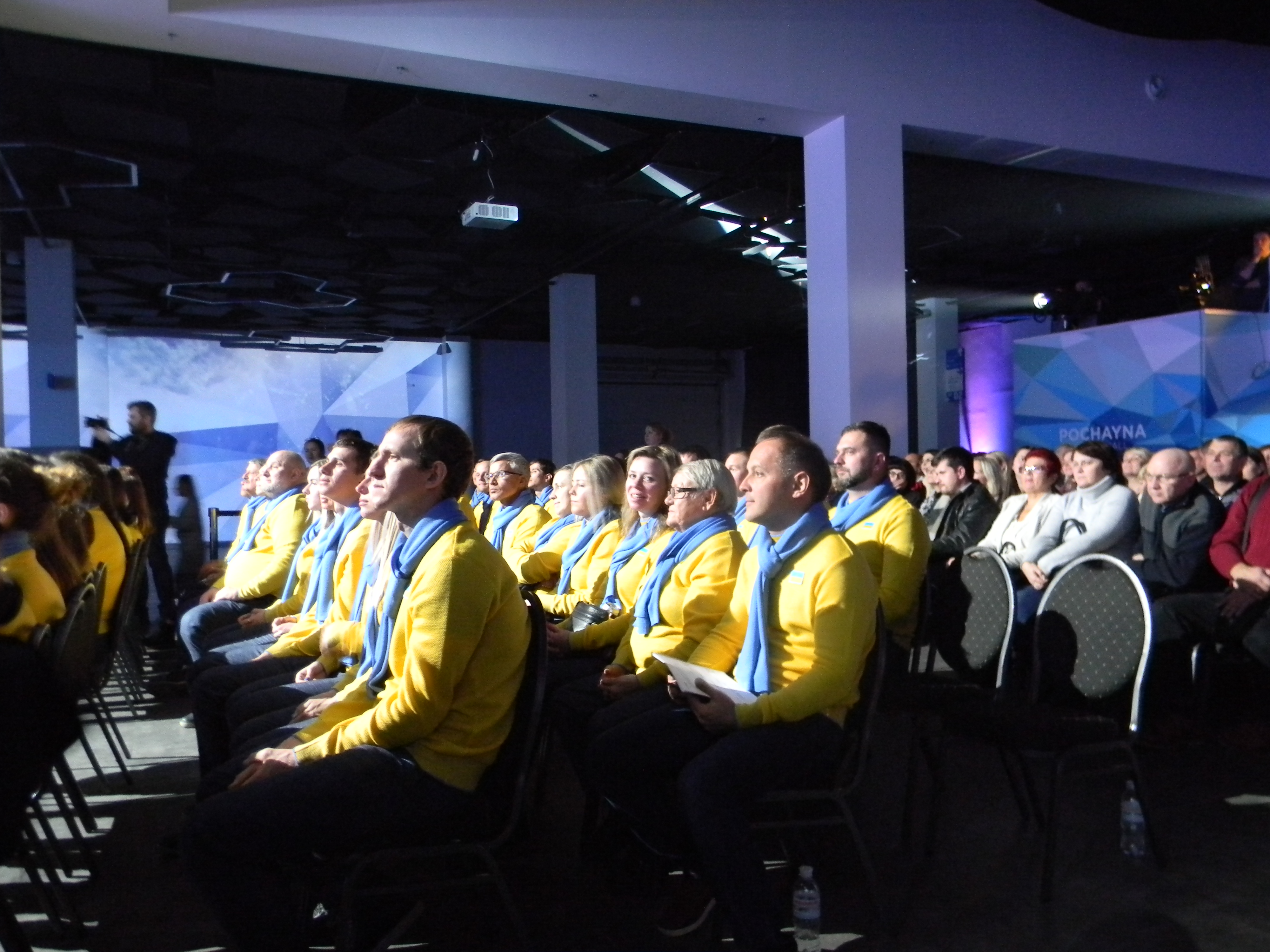 Урочиста подія в честь від'їзду української дефлімпійської збірної на Дефлімпійські ігри 2019 до Італії